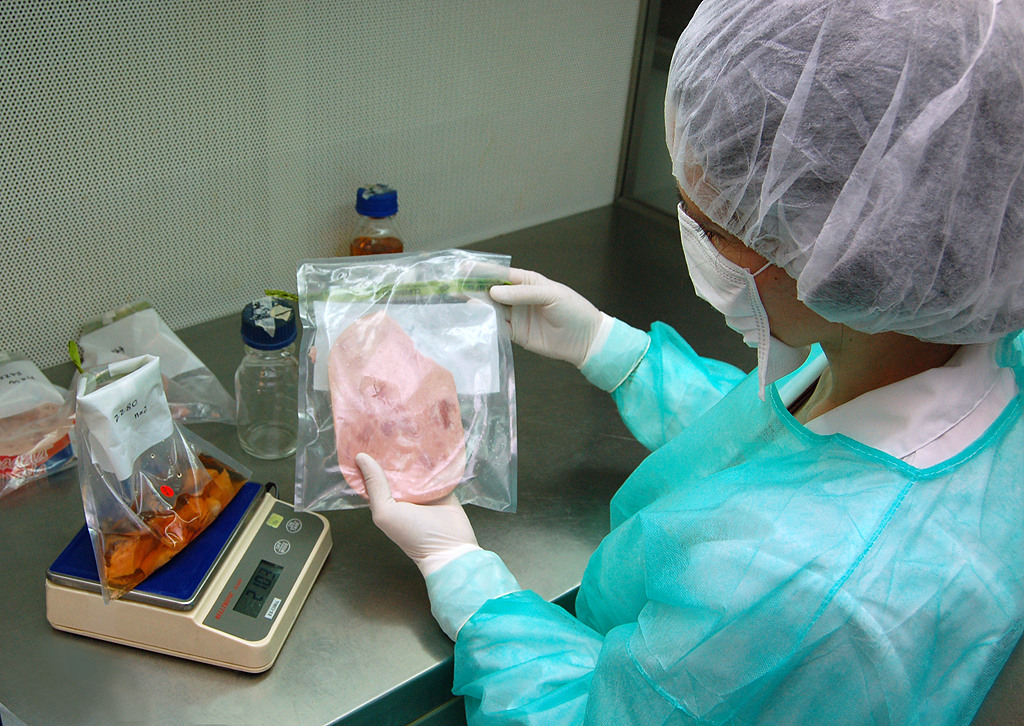 Método para detectar Listeria en productos alimenticios.